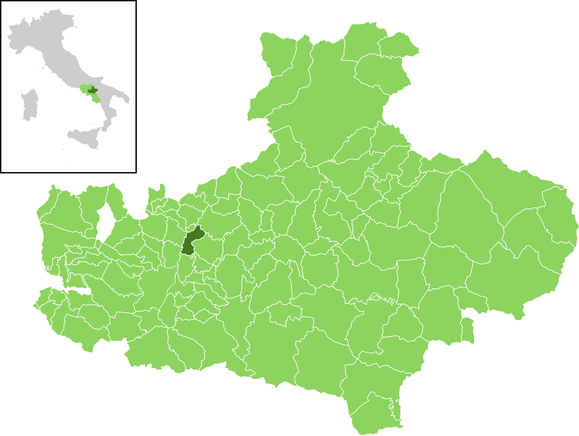 Posizione del comune all'interno della provincia di Avellino